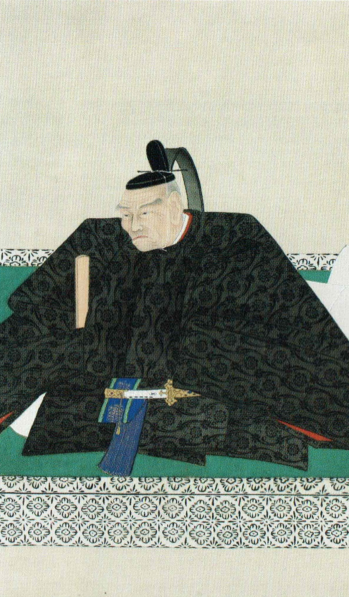 奥平昌高の肖像。